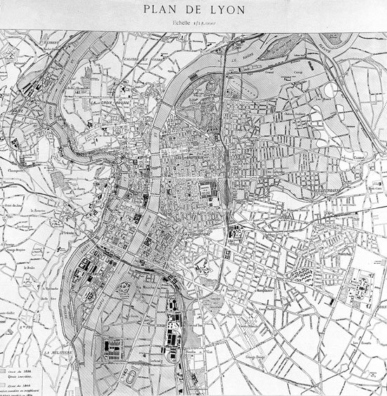 Carte de Lyon représentant les zones inondées au plus fort de la crue de la Saône et du Rhône, les 31 mai et 1er juin 1856.